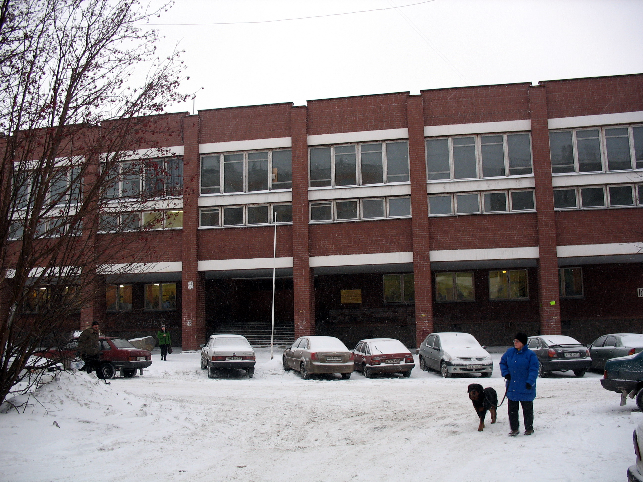 МГПУ 2 корпус